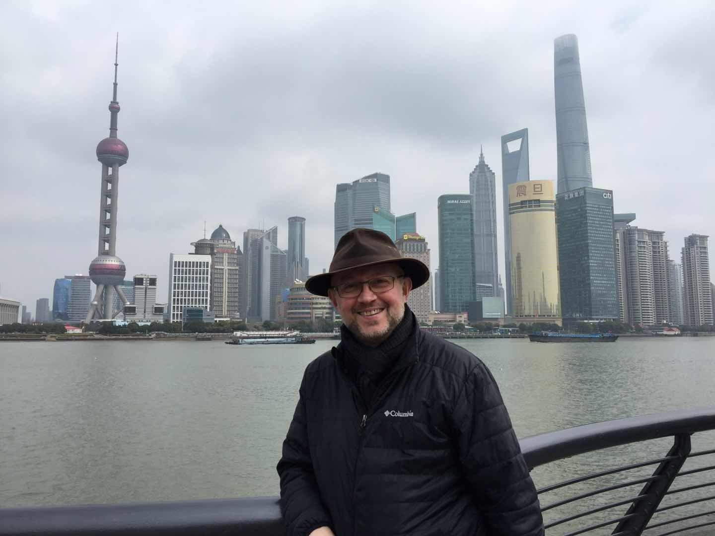 Nicolas Babin en 2018